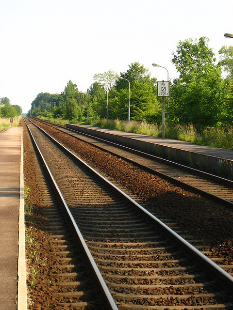 Gare de Rang-du-Fliers - Verton